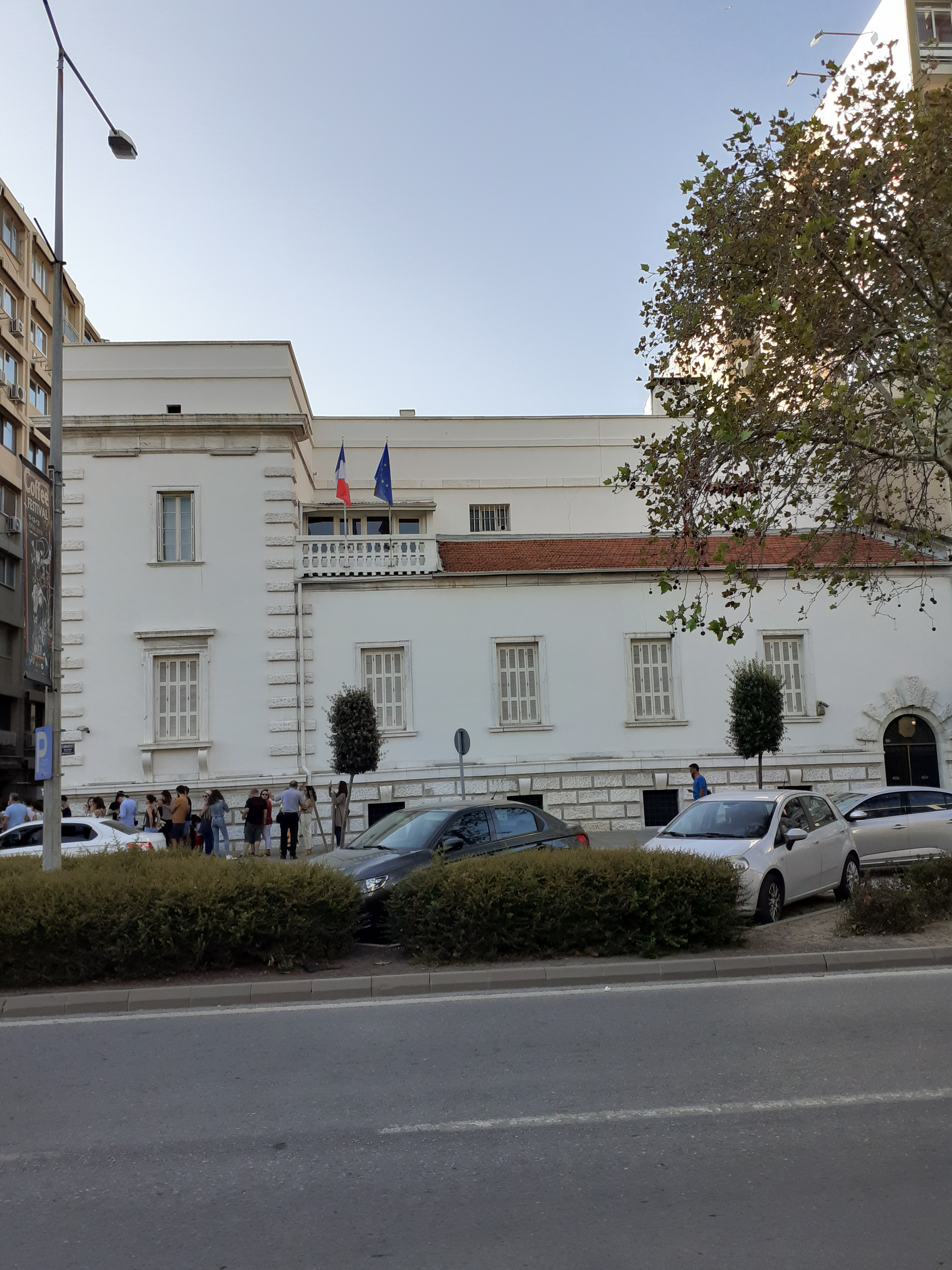 Arkas Sanat Merkezi'nin Cumhuriyet Bulvarı'ndan görünümü ve Picasso sergisi için gelen kalabalık.